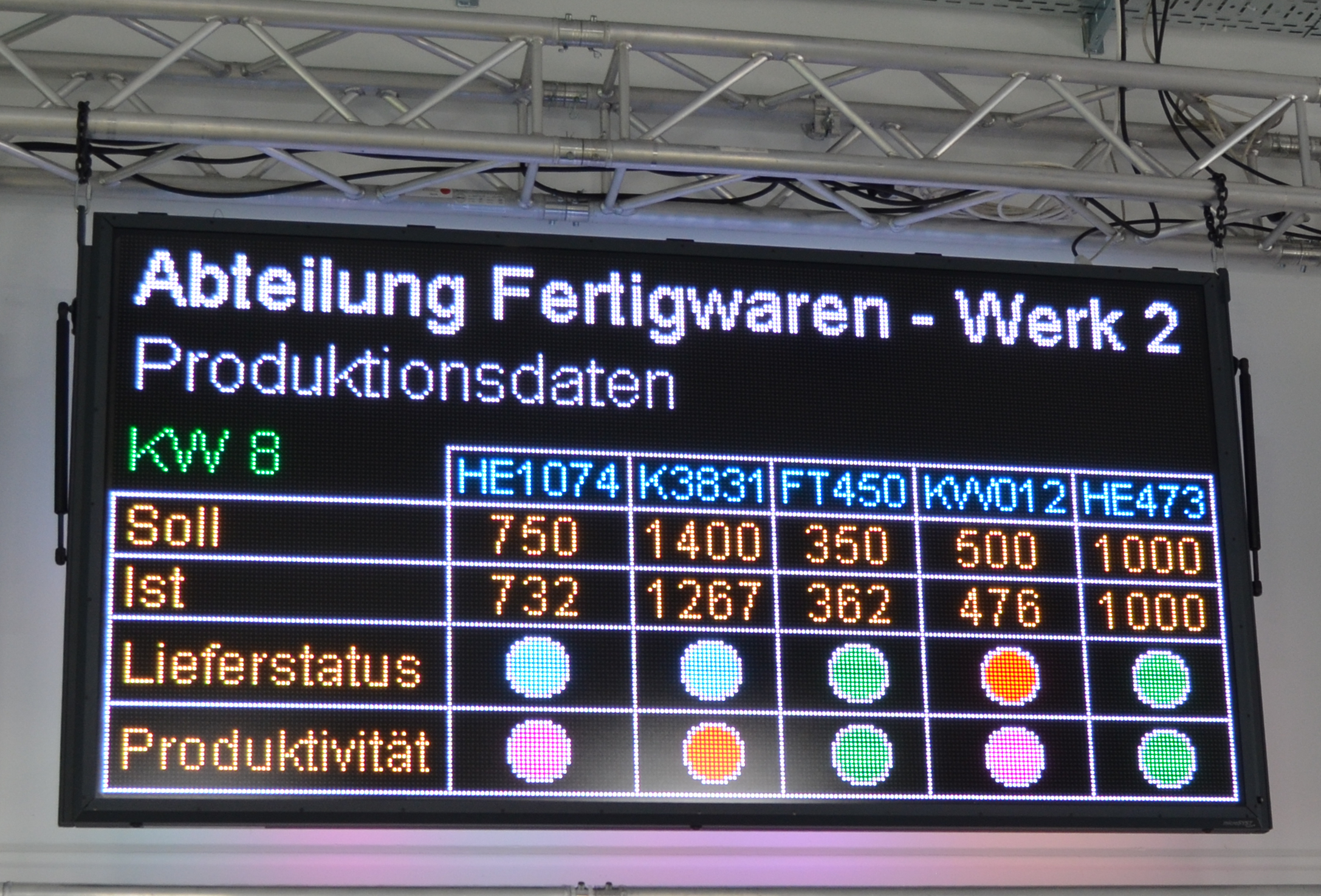 Andon-Board mit Soll-Ist-Werten für Produktionslinien sowie Visualisierung des Lieferstatus und der Produktivität nach dem Ampel-Prinzip